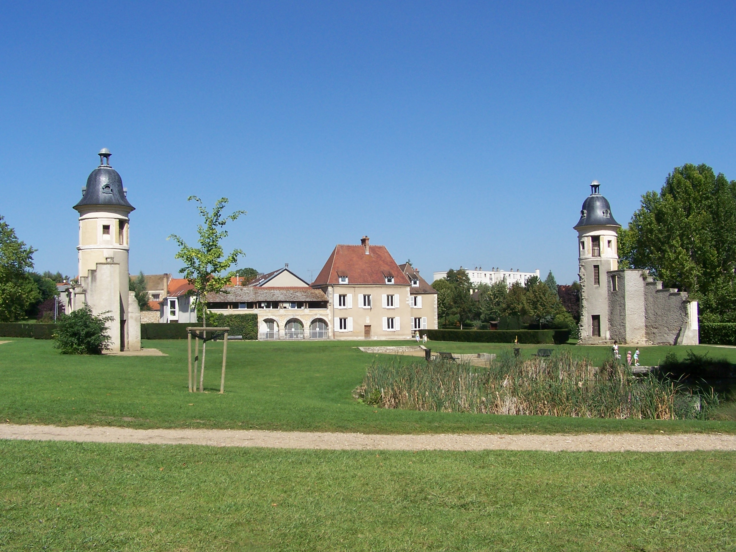 Château des Clayes-sous-Bois (Yvelines, France) ou ce qu'il en reste ! (il a été incendié par les troupes allemandes lors de leur départ en août 1944) Photo personnelle Castle of Clayes-sous-Bois (Yvelines, France)or what is left ! Personal picture. Auteur/Author : ℍenry Salomé